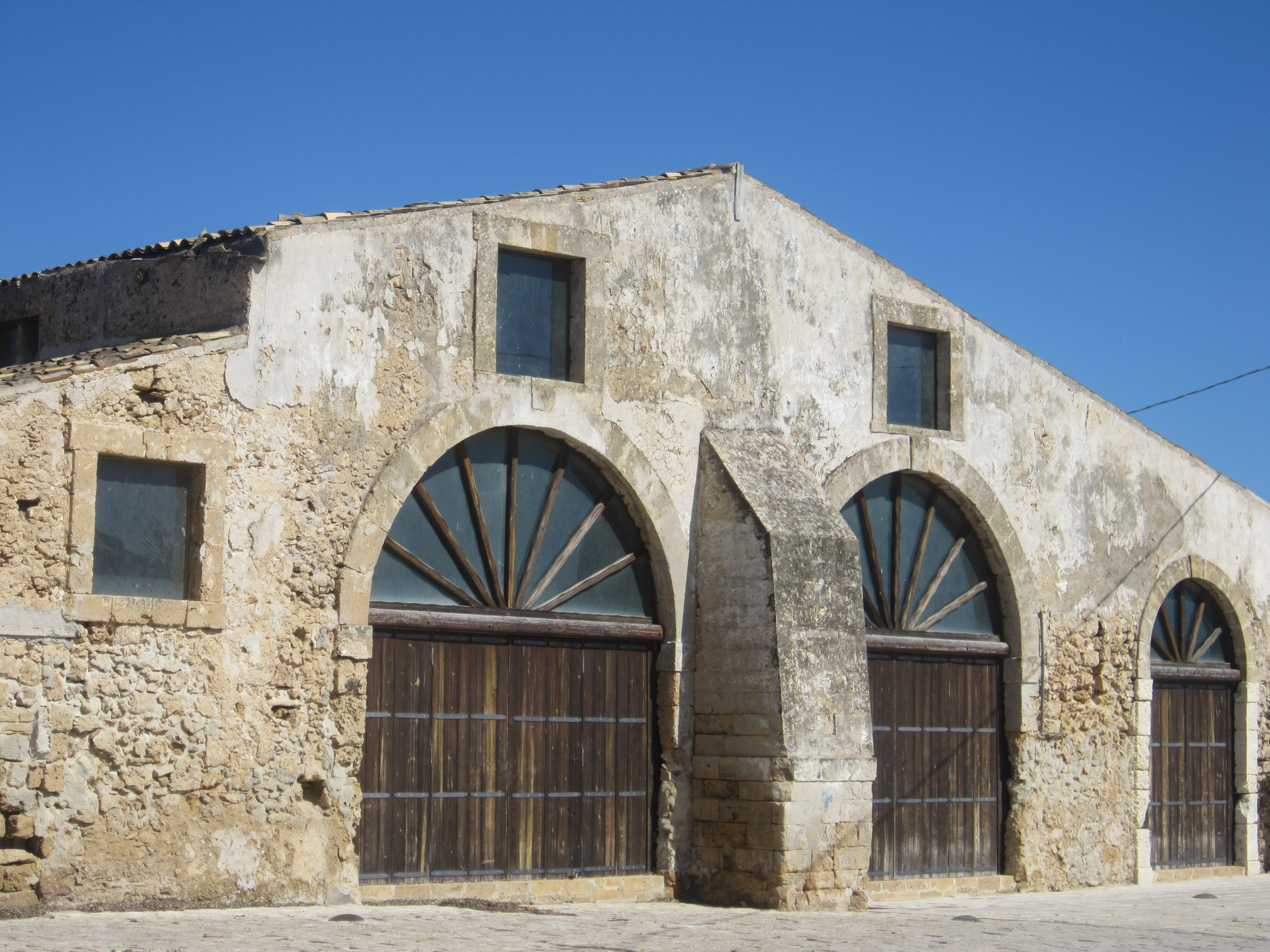 Piazza Regina Margherita, Marzamemi: Tonnara